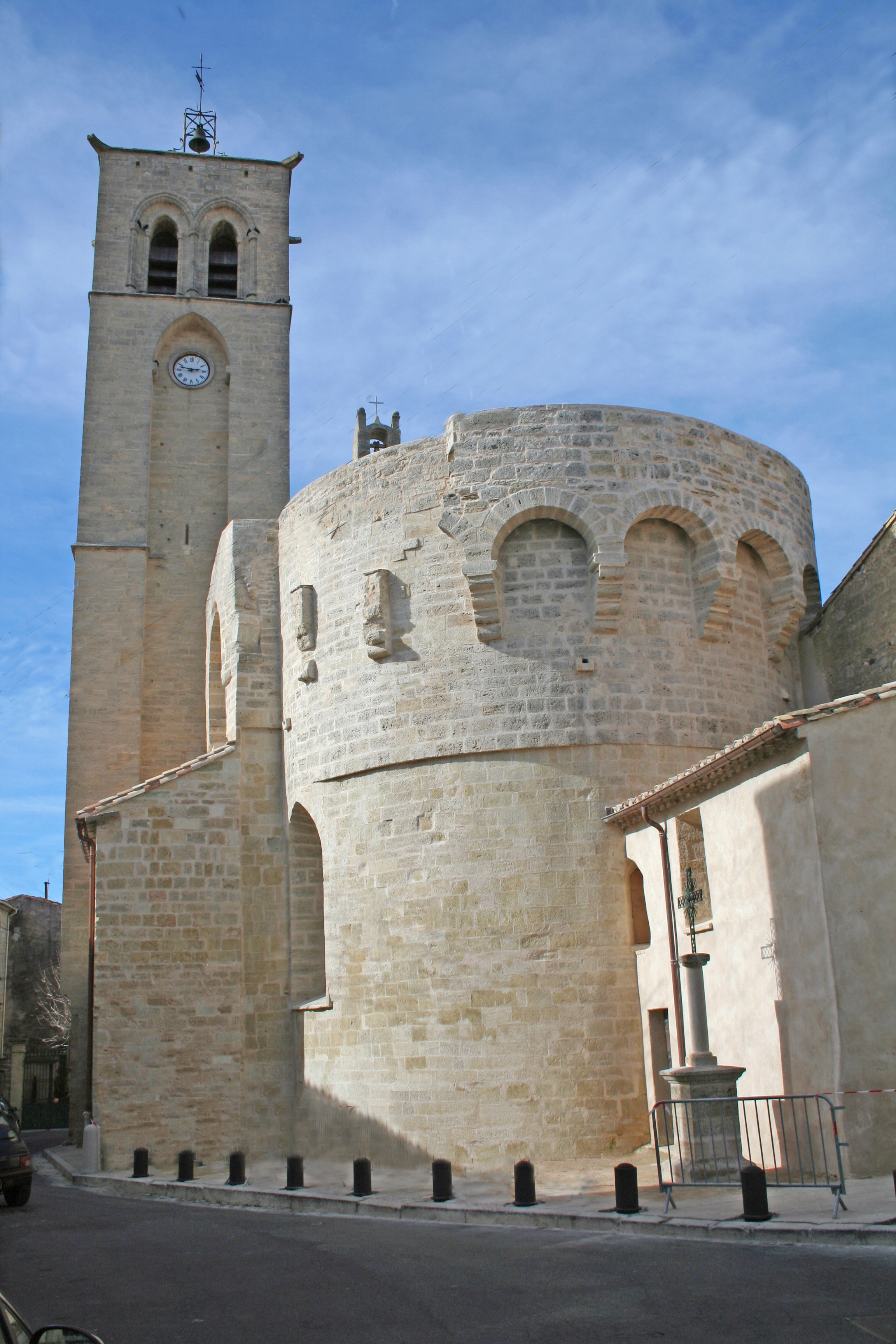 Montblanc (Hérault) - chevet roman de l'église Sainte-Eulalie.